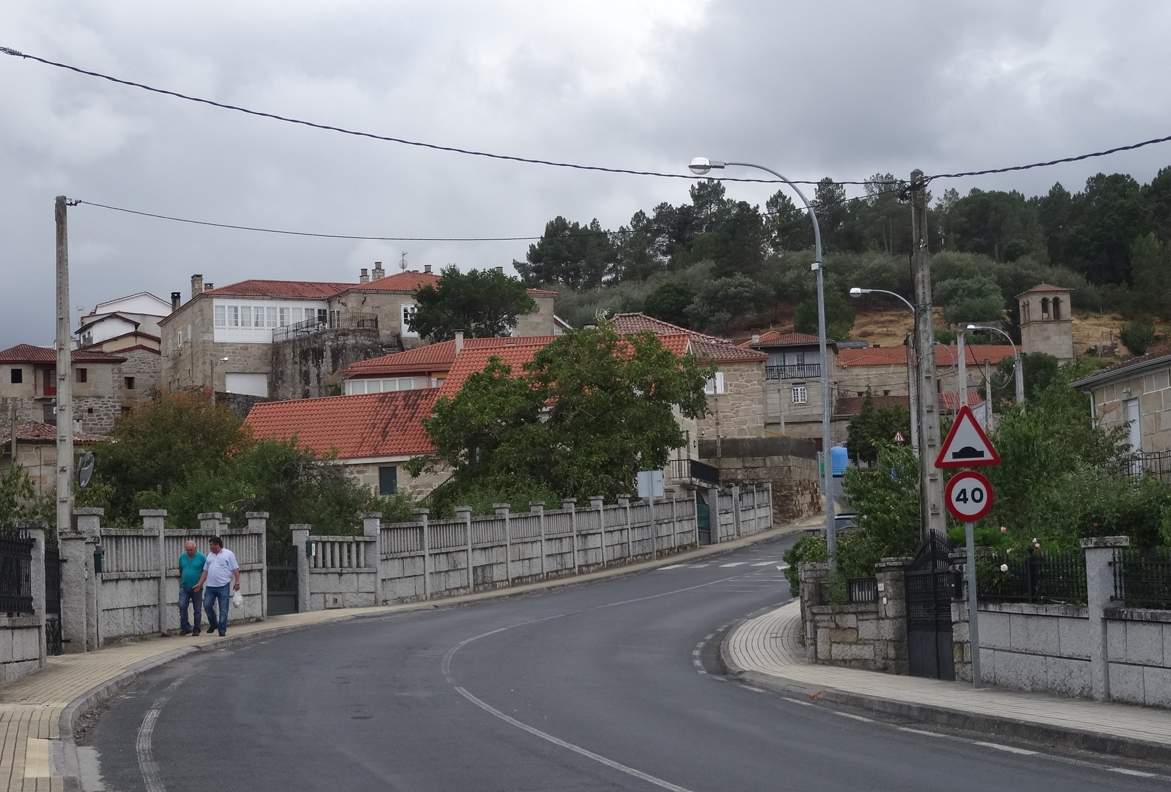 Ver título.